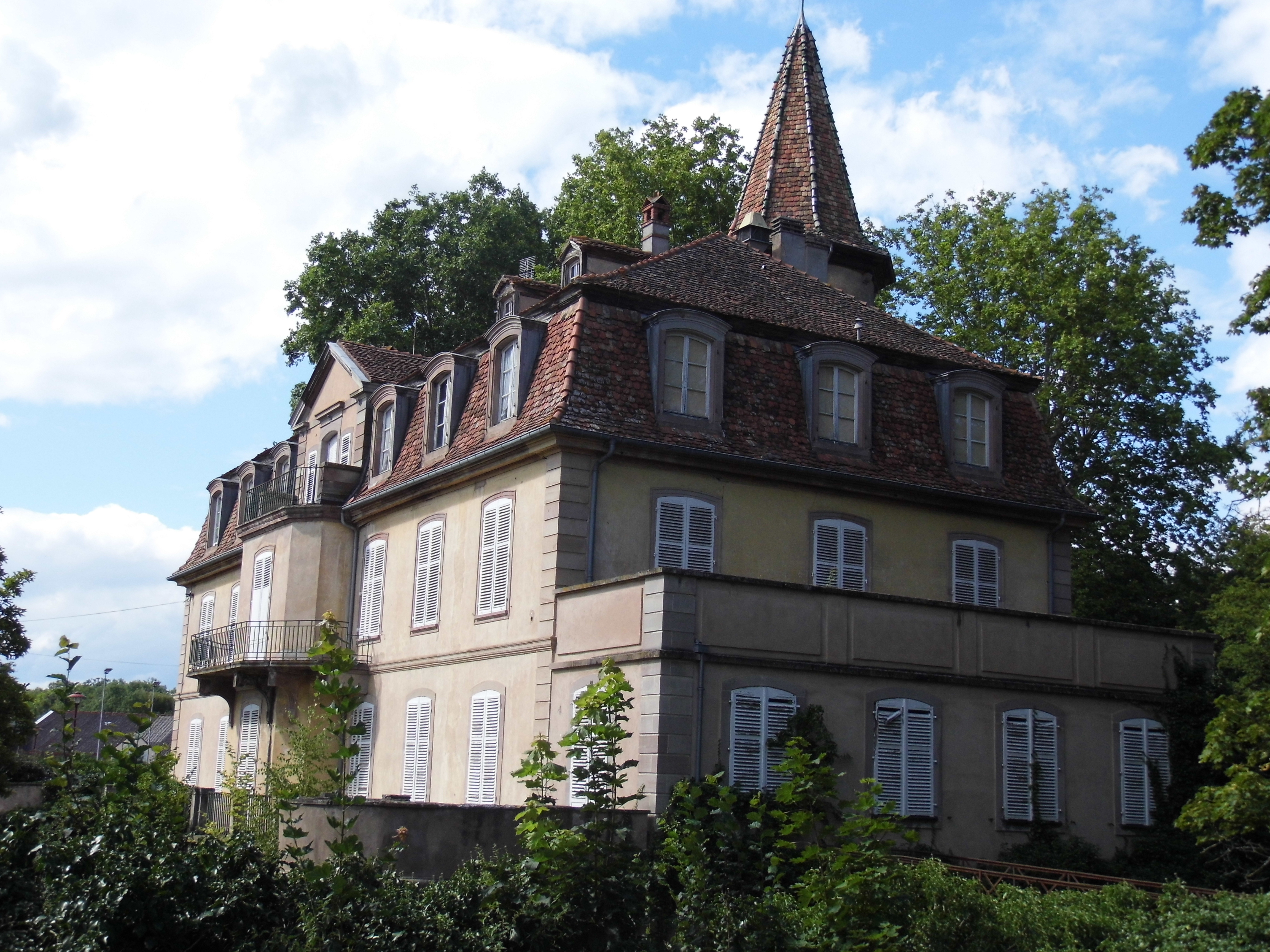 château de HELL